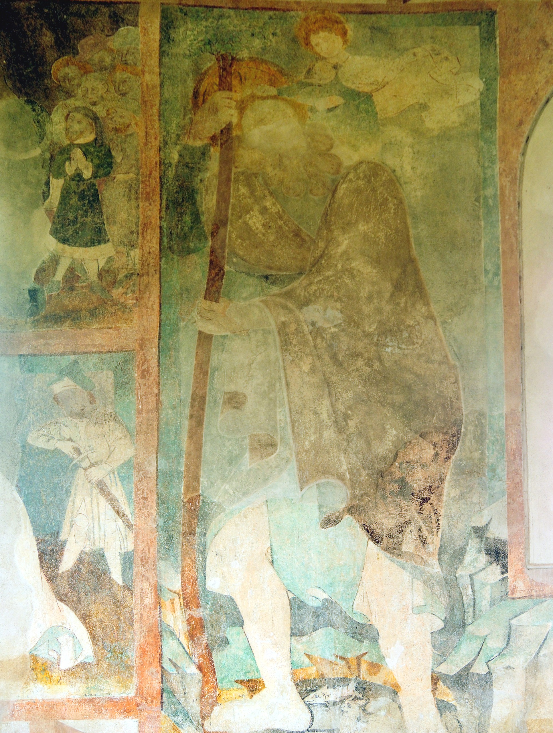 Peterskirche Blansingen: Christopherusdarstellung